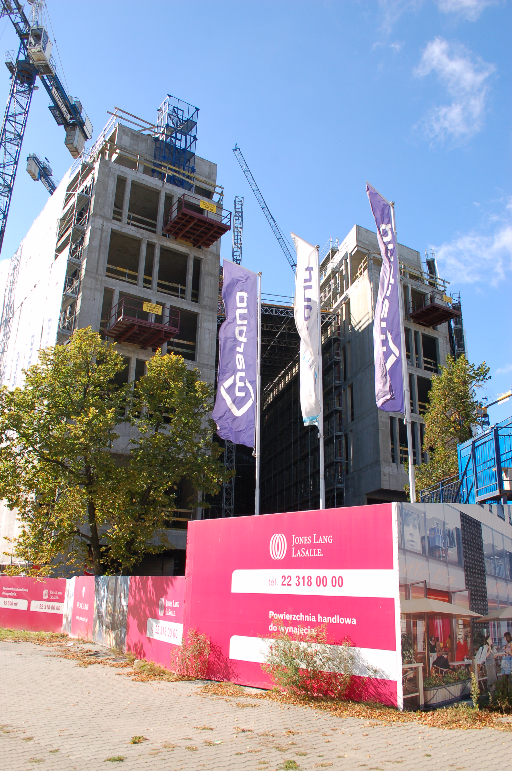 Warsaw, Plac Unii